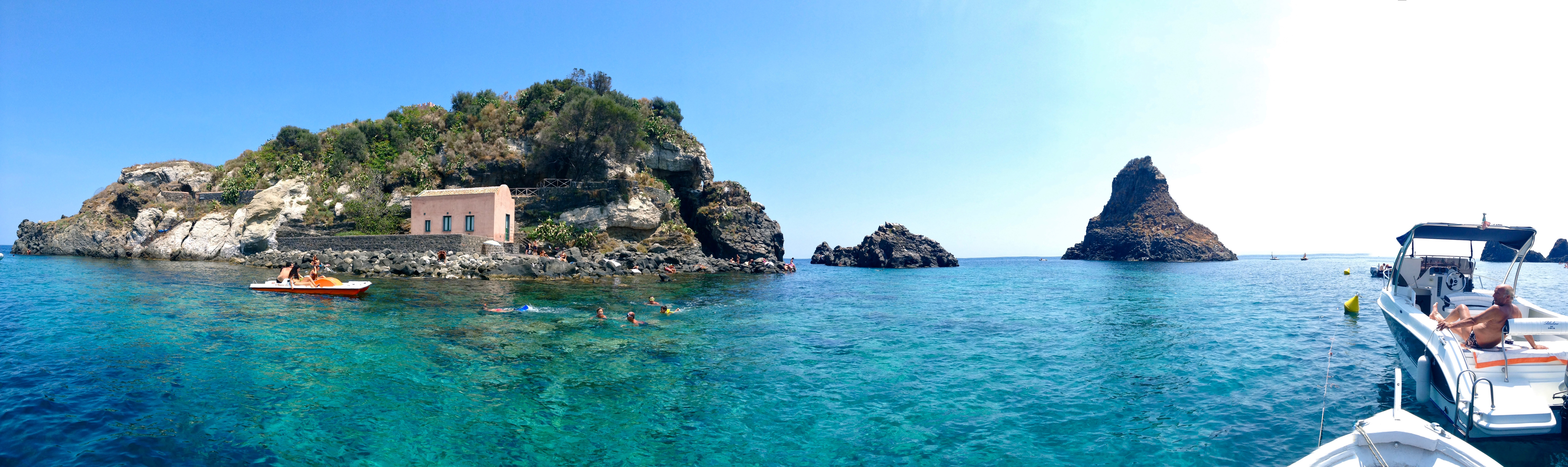 L'isola lachea in estate con il suo mare cristallino